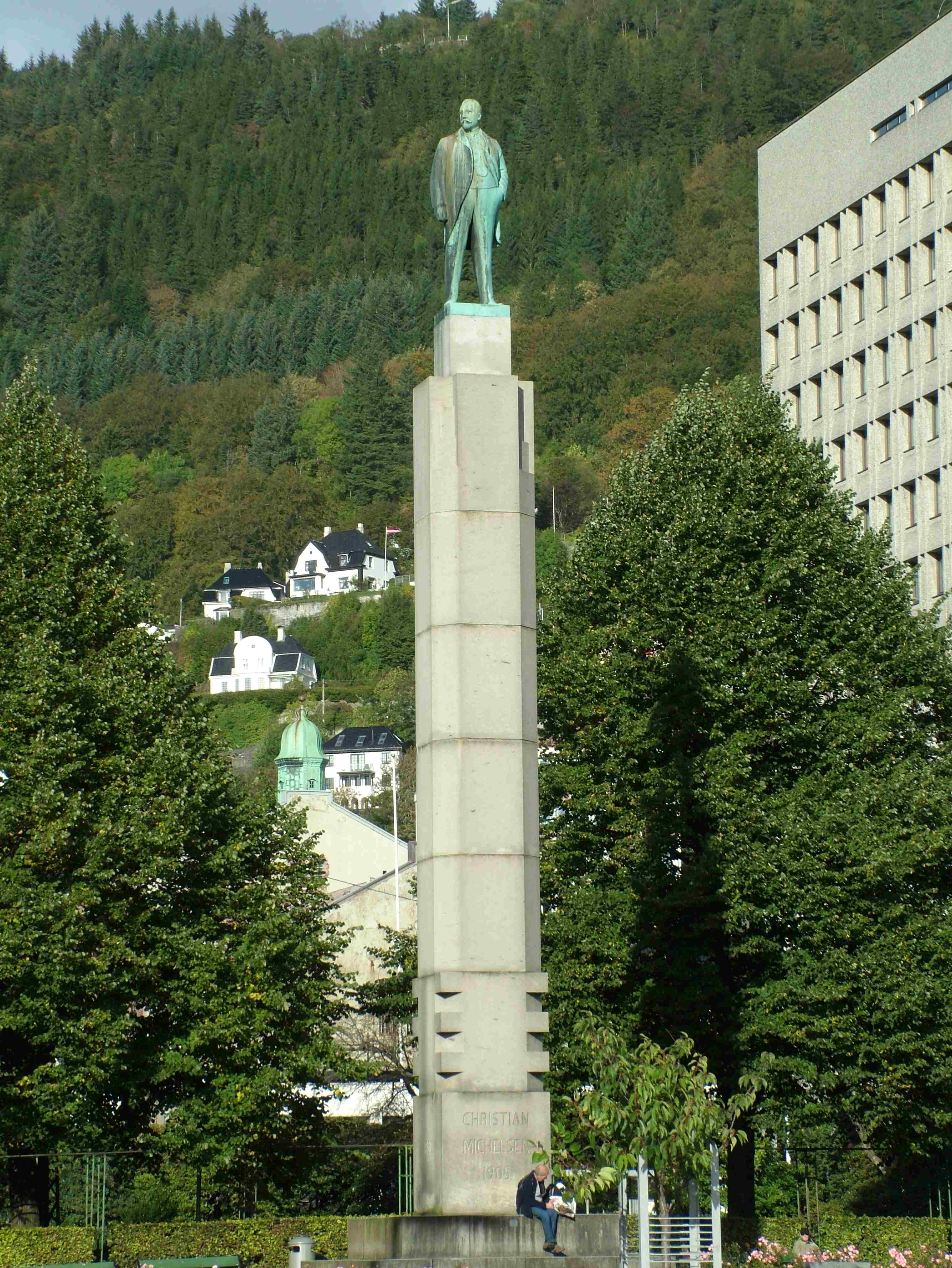 Bergen in Norwegen. Das Denkmal zeigt den Politiker Christian Michelsen in Bergen.